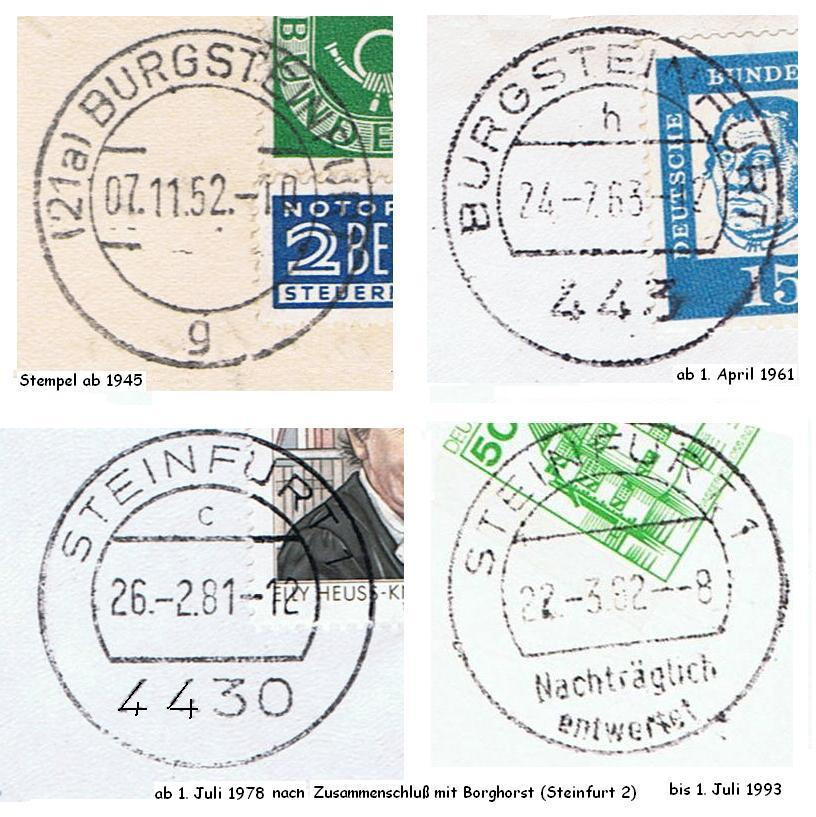 die gebräuchlichsten Stempel der Bundespost